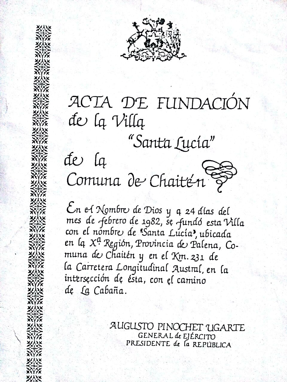 Acta oficial de fundación de Villa Santa Lucia 1982